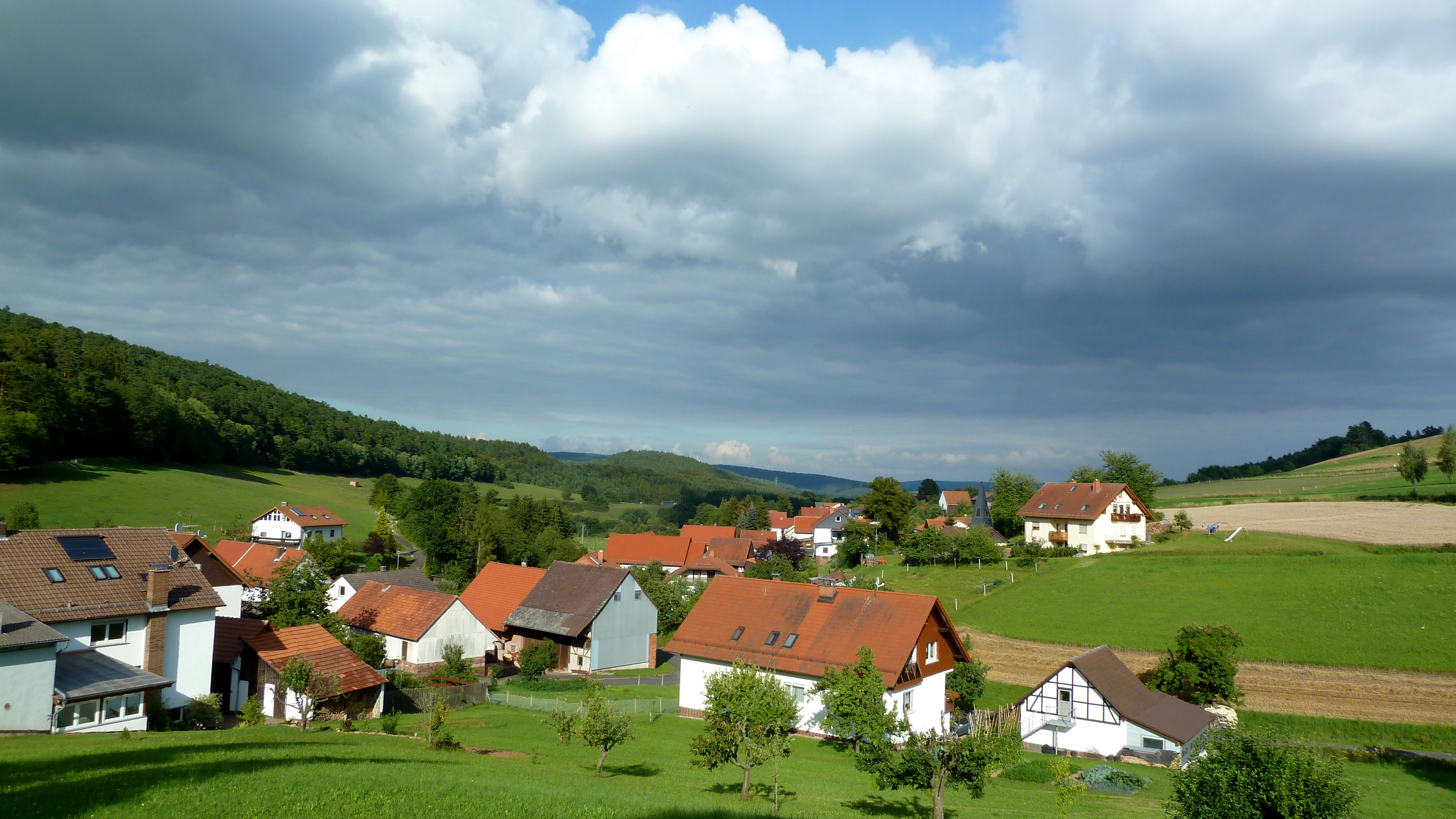 Ortsansicht von Biedebach